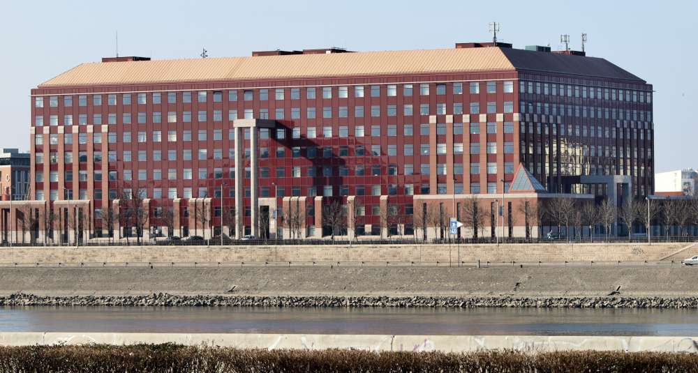 ELTE, déli épület, Lágymányos (Budapest, XI. ker., Pázmány Péter sétány)